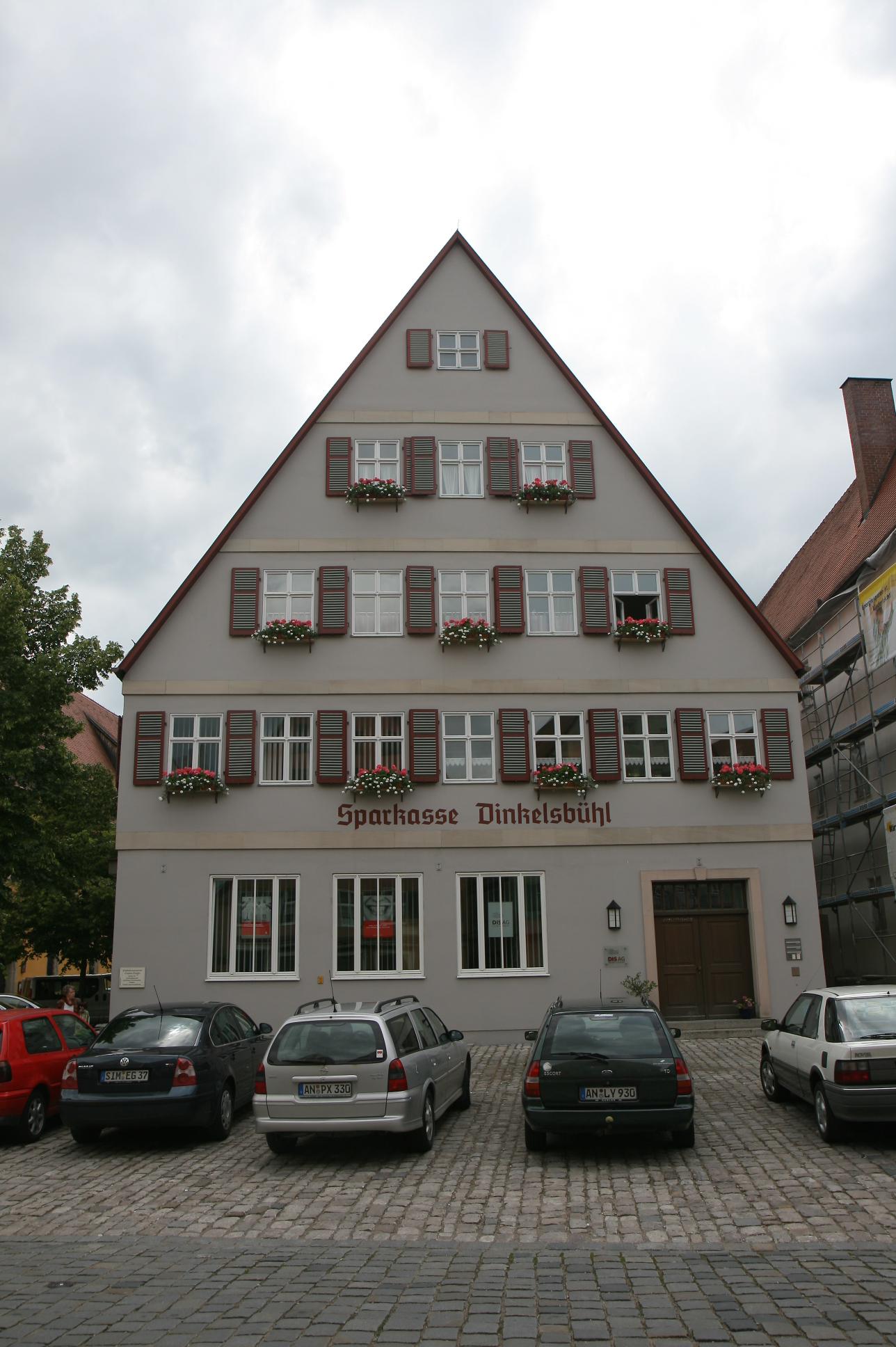 Kreis- und Stadtsparkasse Dinkelsbühl, jjetzt Sparkasse Ansbach, Dr.-Martin-Luther-Straße in Dinkelsbühl.